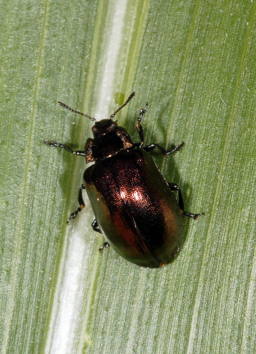 Weidenblattkäfer (Chrysomela aenea), Knüllwald, Hessen, Deutschland